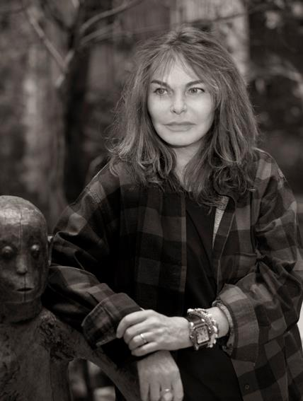 Portrait de Bettina Rheims par Bettina Rheims.